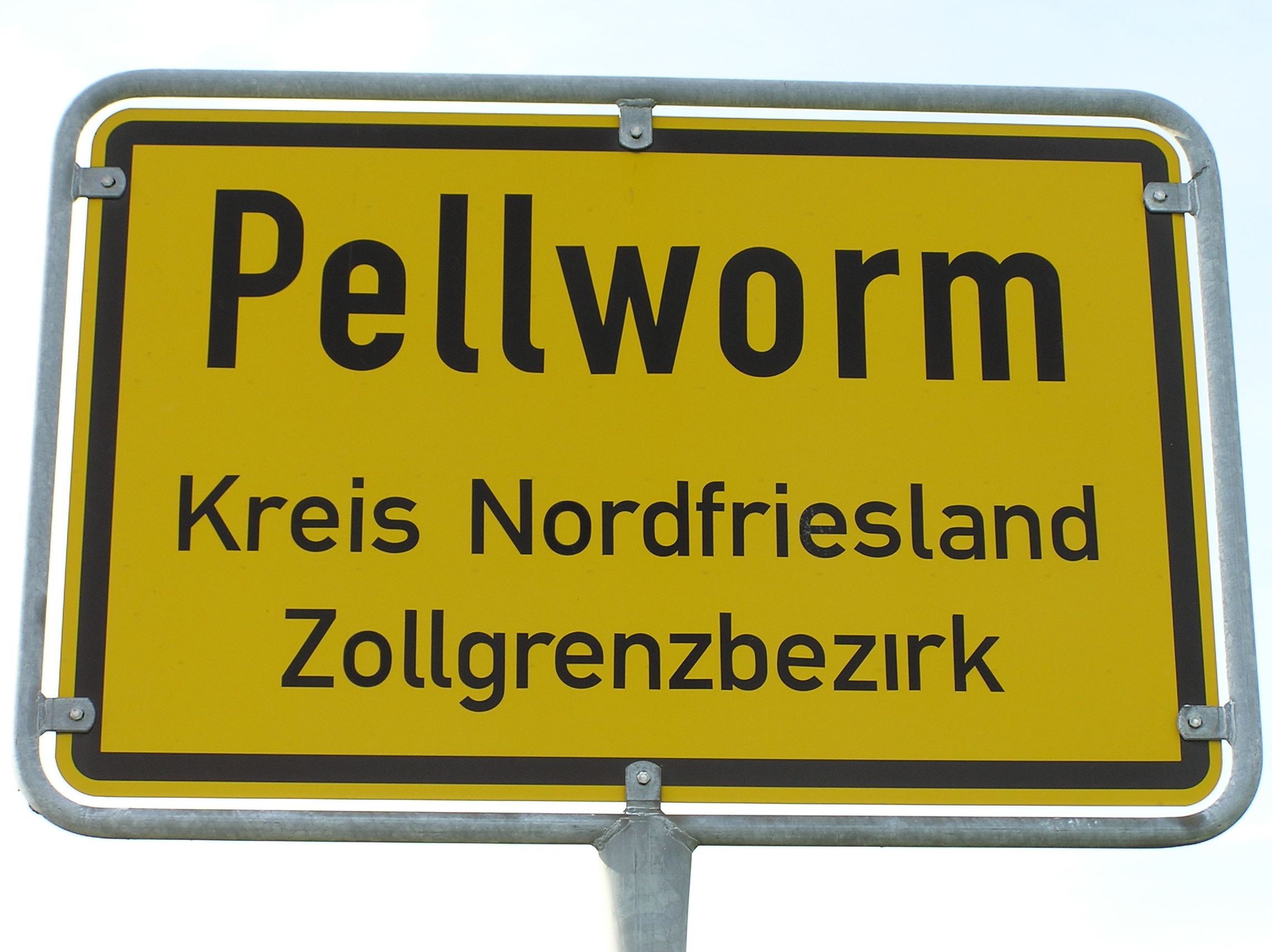 Sign